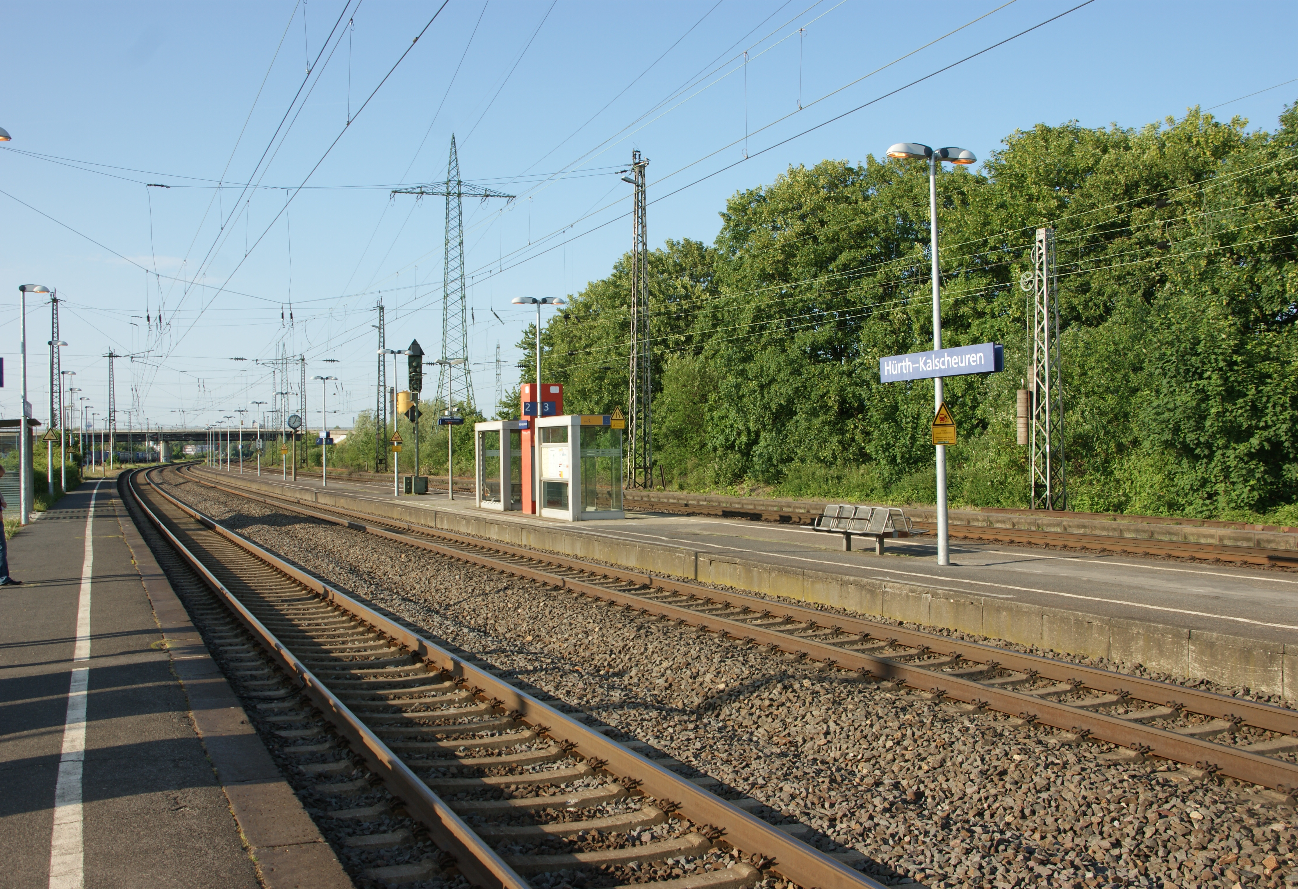 Bahnhof Hürth-Kalscheuren, Schienenstrecke Köln-Bonn